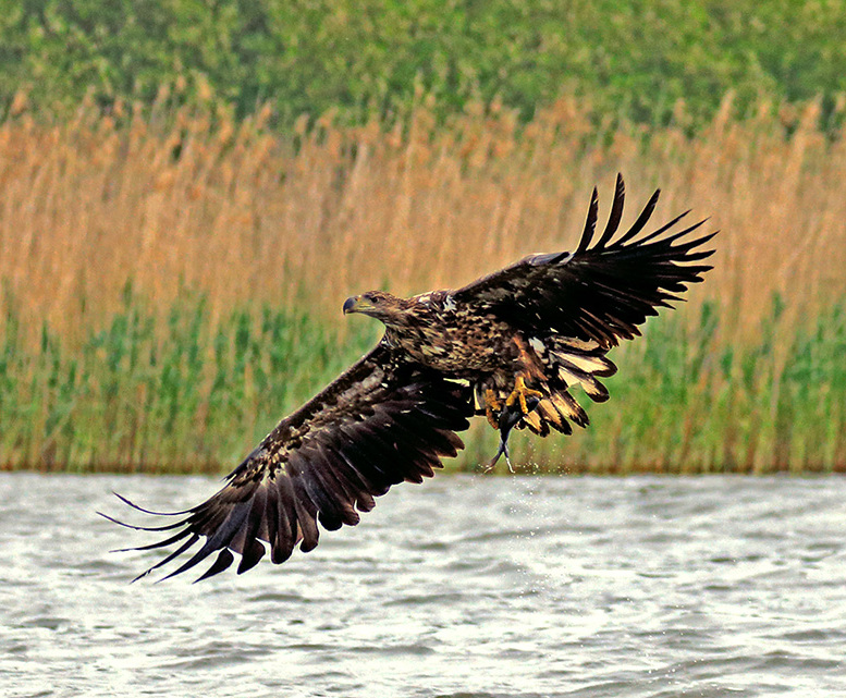 Seeadler nach Fang im Malchiner See.